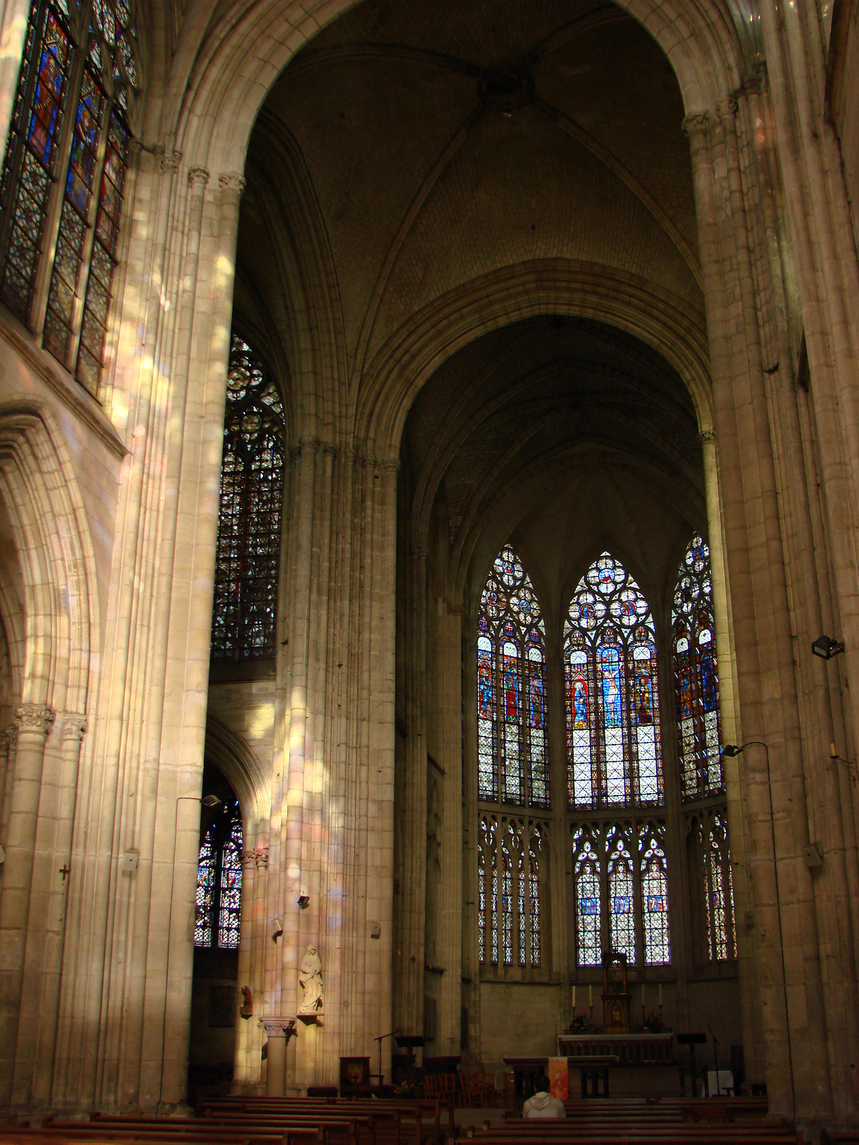 Basilique Saint-Urbain, à Troyes (construite de 1262 à 1286, sur l'ordre du pape Urbain IV, qui était originaire de cette ville): vue du choeur.